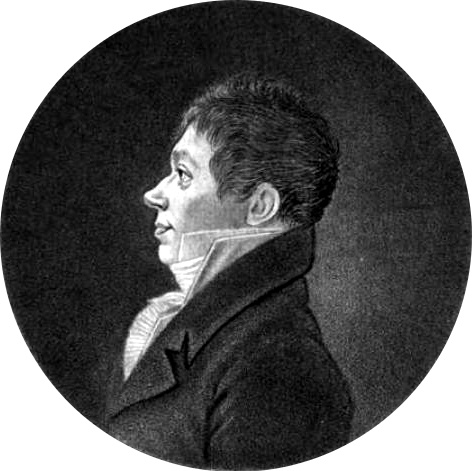 Gerhard Anton von Halem (* 2. März 1752 in Oldenburg (Oldenburg); † 4. Januar 1819 in Eutin) war ein deutscher Schriftsteller, Jurist und Oldenburger Verwaltungsbeamter.